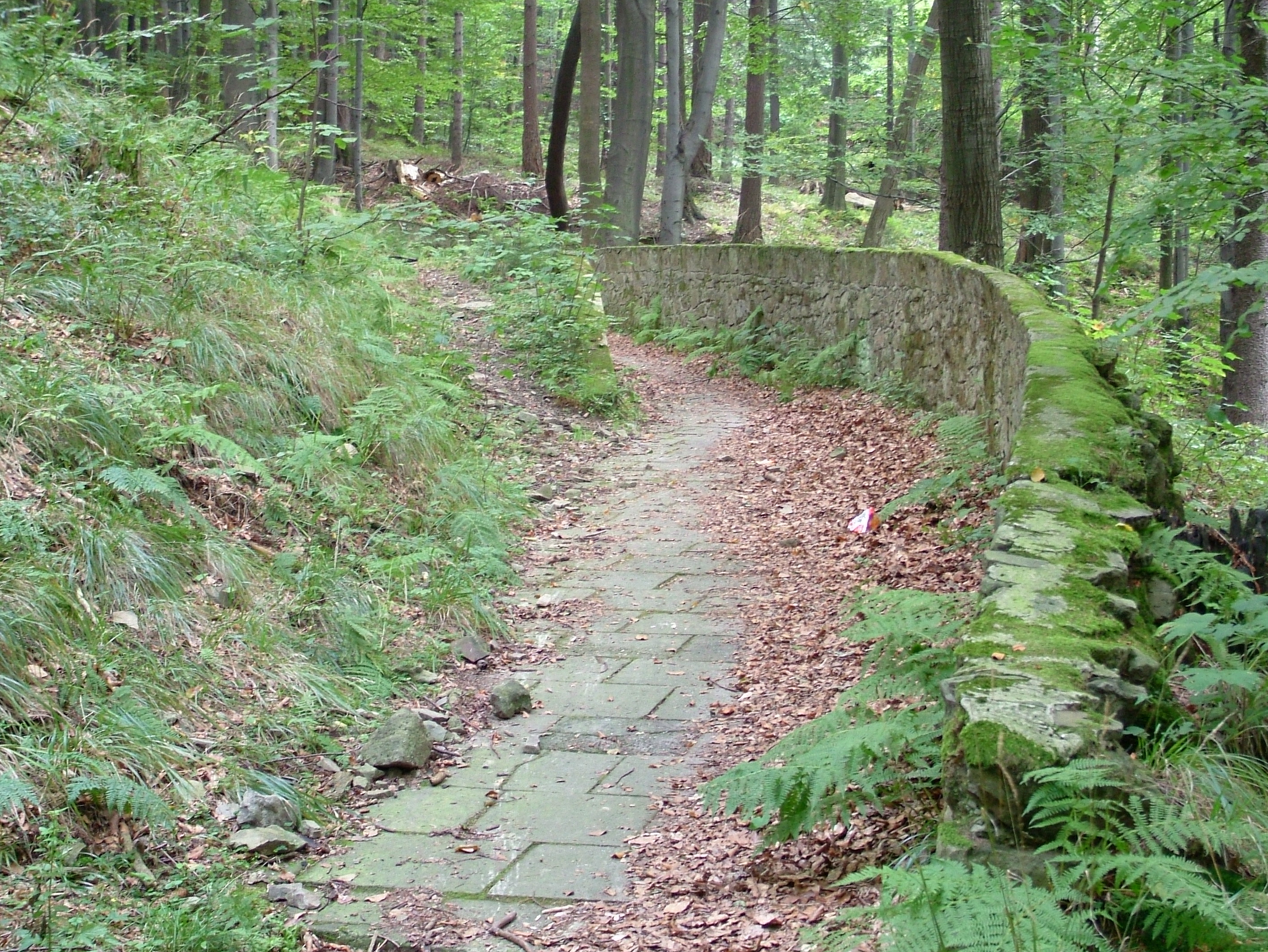 Nieczynny tor saneczkowy na Koziej Gorze w Bielsku-Bialej.jpg